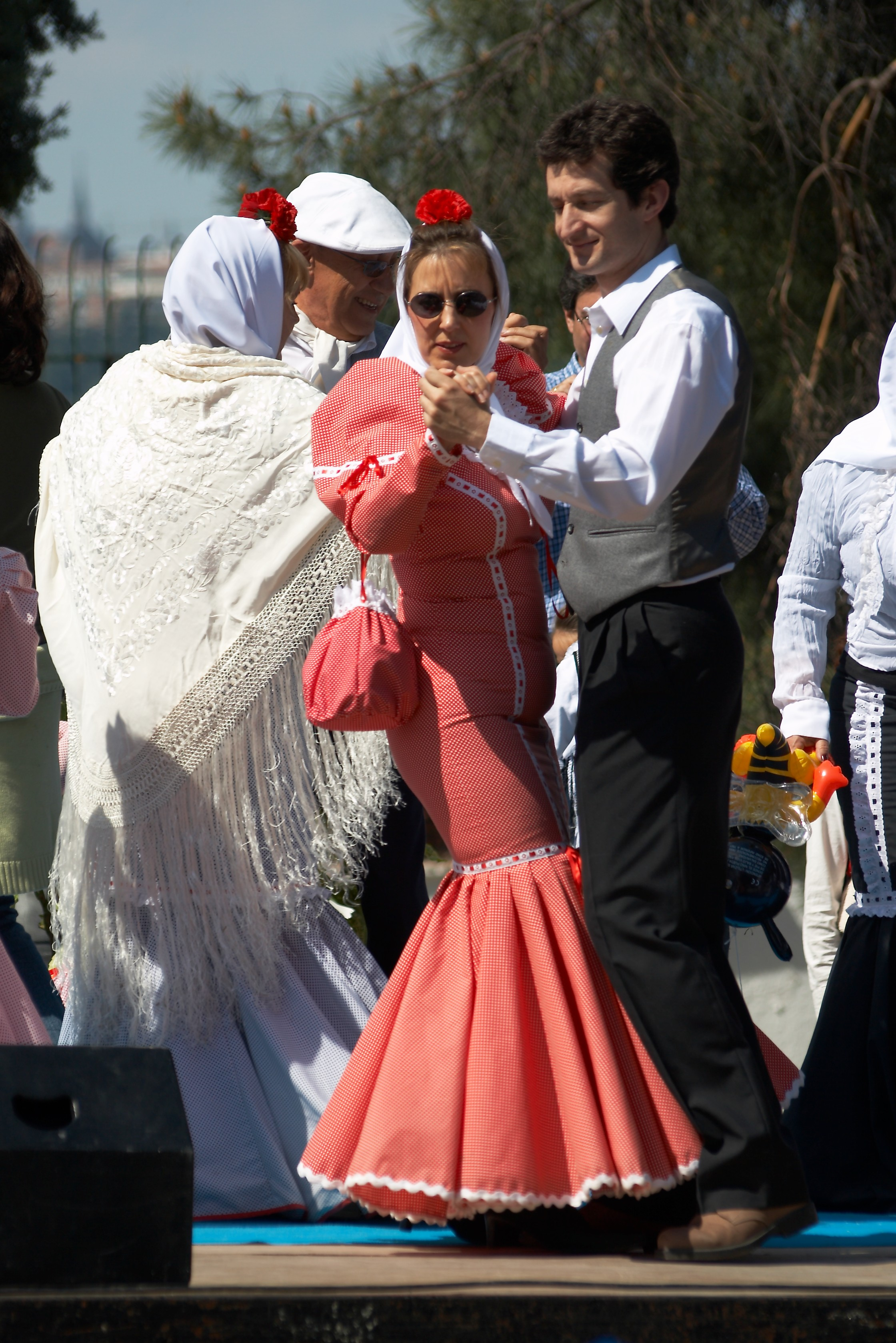 Chulapos. Fiestas de San Isidro 2007, Madrid, España.